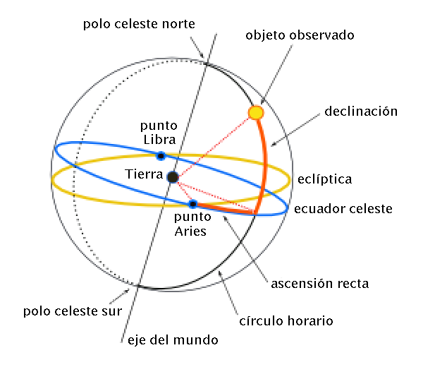 AUTHOR: Francisco Javier Blanco González PAÍS: España IMAGE: las coordenadas ecuatoriales: ascensión recta y declinación. Image made by Inkscape (.svg to .png)